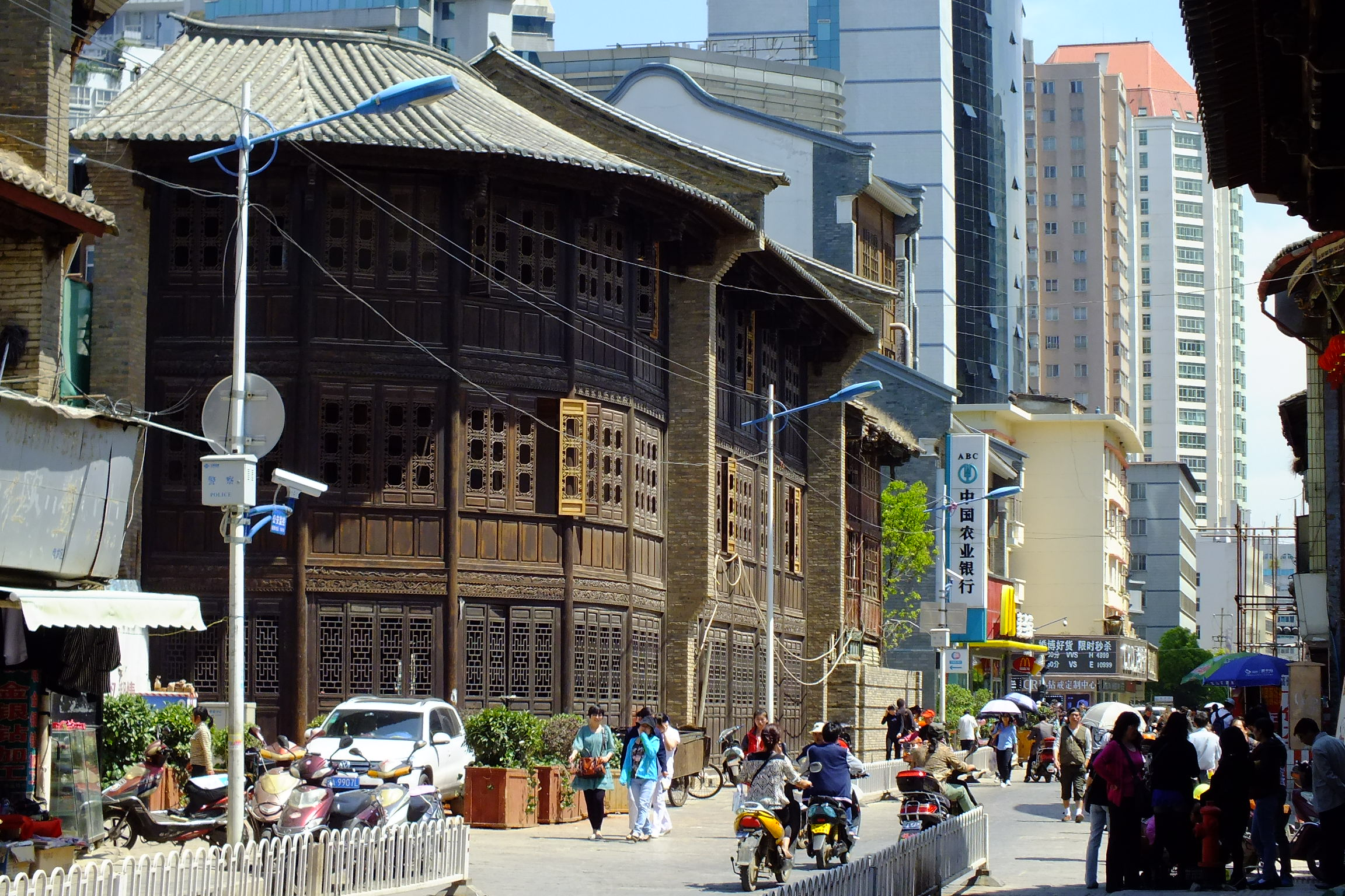 2015-03-20 Wuhua District, Yunnan, Kunming(雲南省昆明市五華区, 中国) 光華街